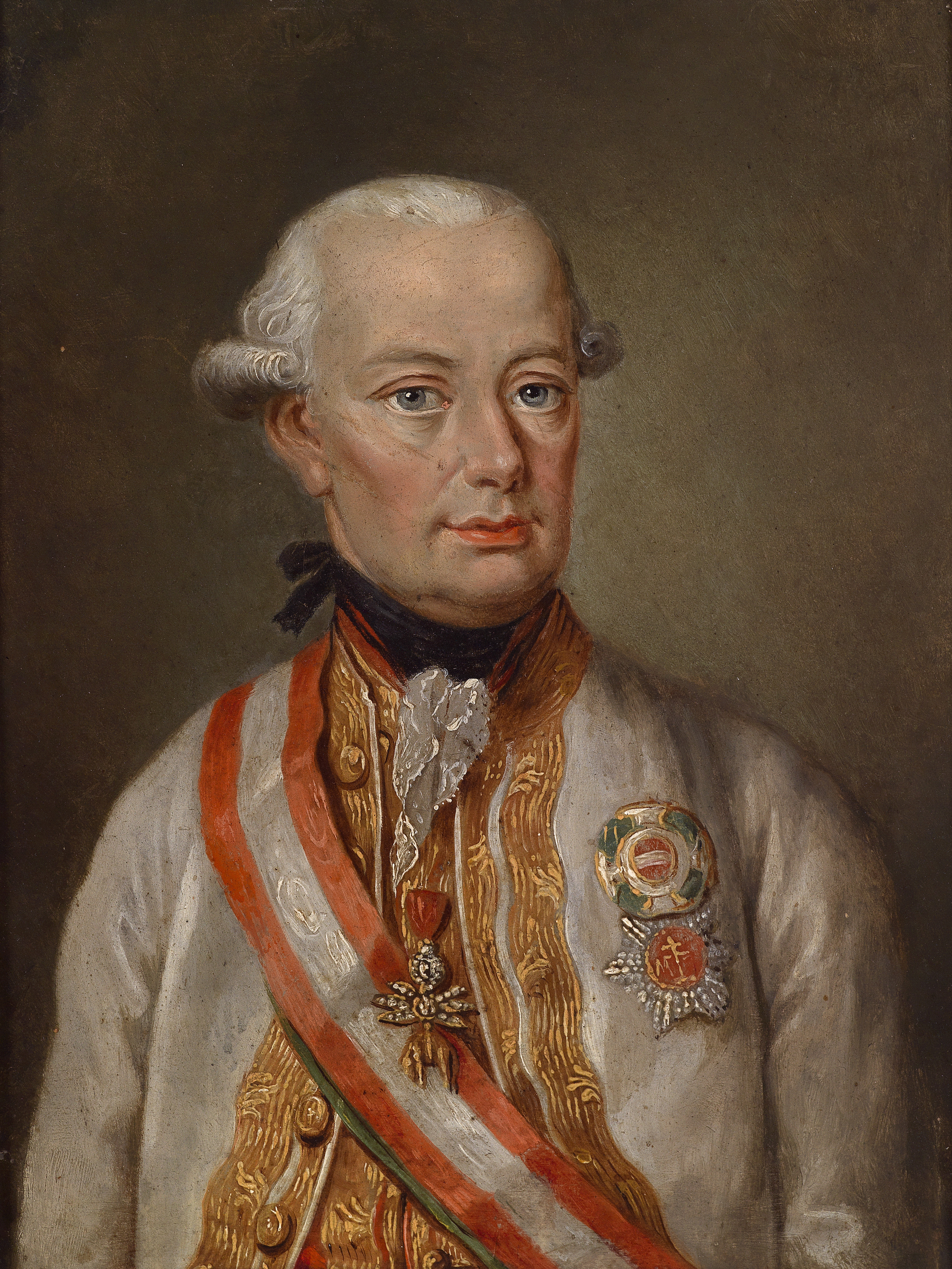 Abgebildete Personen: Kaiser Leopold II. Sohn des Franz I. Stephan Habsburg Österreich